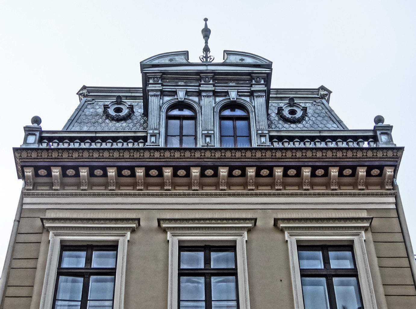 Kamienica przy ul. Długiej 12 w Bydgoszczy (1876-1878)